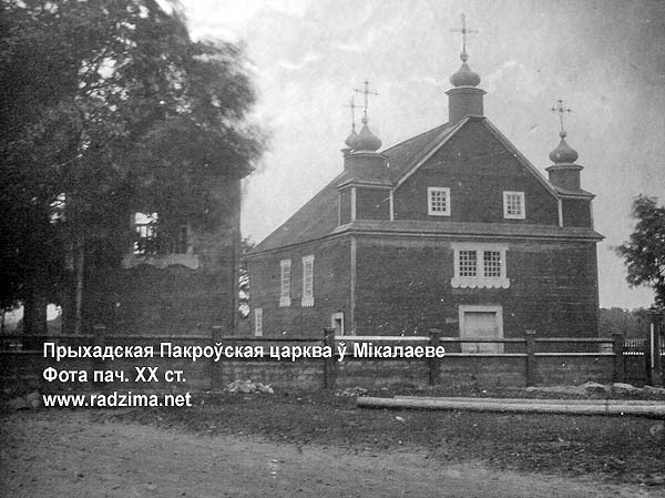 Беларуская (тарашкевіца): Мікалаеў (Mikałajeŭ). Царква Покрыва Багародзіцы